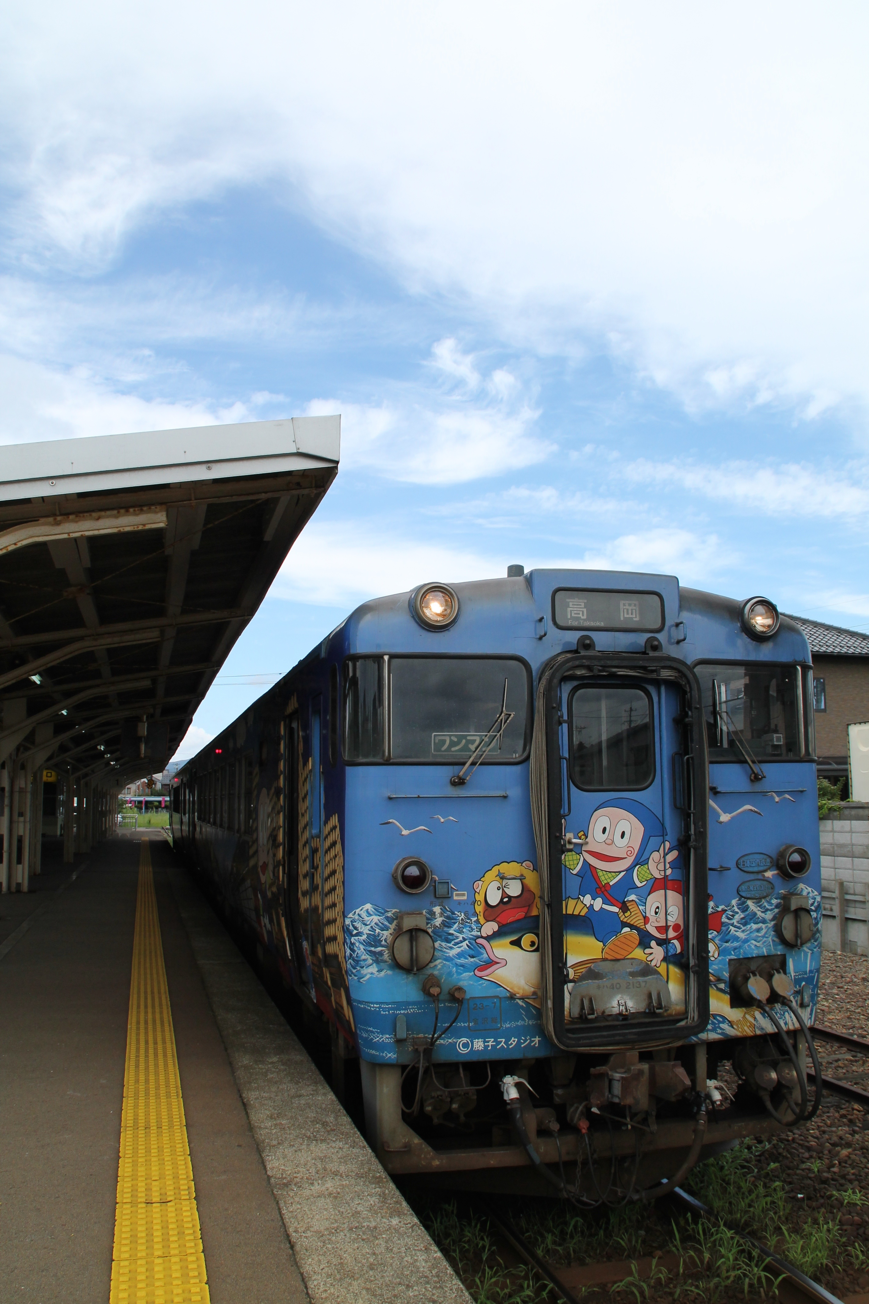 Ninja Hattori-kun Train